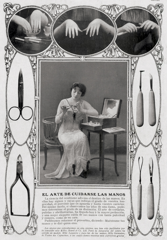 From Elegancias